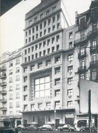 Casa del Teatro, inaugurada en 1938. Obra del arquitecto Alejandro Virasoro, fue en 1927 una iniciativa de la cantante lírica Regina Pacini de Alvear, esposa del entonces presidente Marcelo T. de Alvear. Da vivienda a actores de teatro, cine y televisión. También aloja al Teatro Regina. Buenos Aires, Argentina.